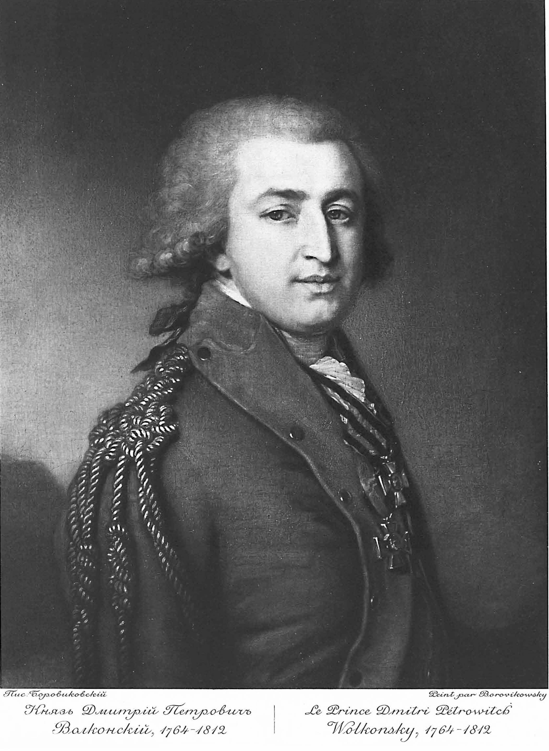 Князь Дмитрий Петрович Волконский (1762—1812), сын статского советника Петра Александровича (1724-1812) от брака с Анисьей Ивановной Гагиной, родной дядя фельдмаршала светлейшего князя Петра Михайловича Волконского. Был женат на Екатерине Алексеевне Мельгуновой, но потомства не оставил.